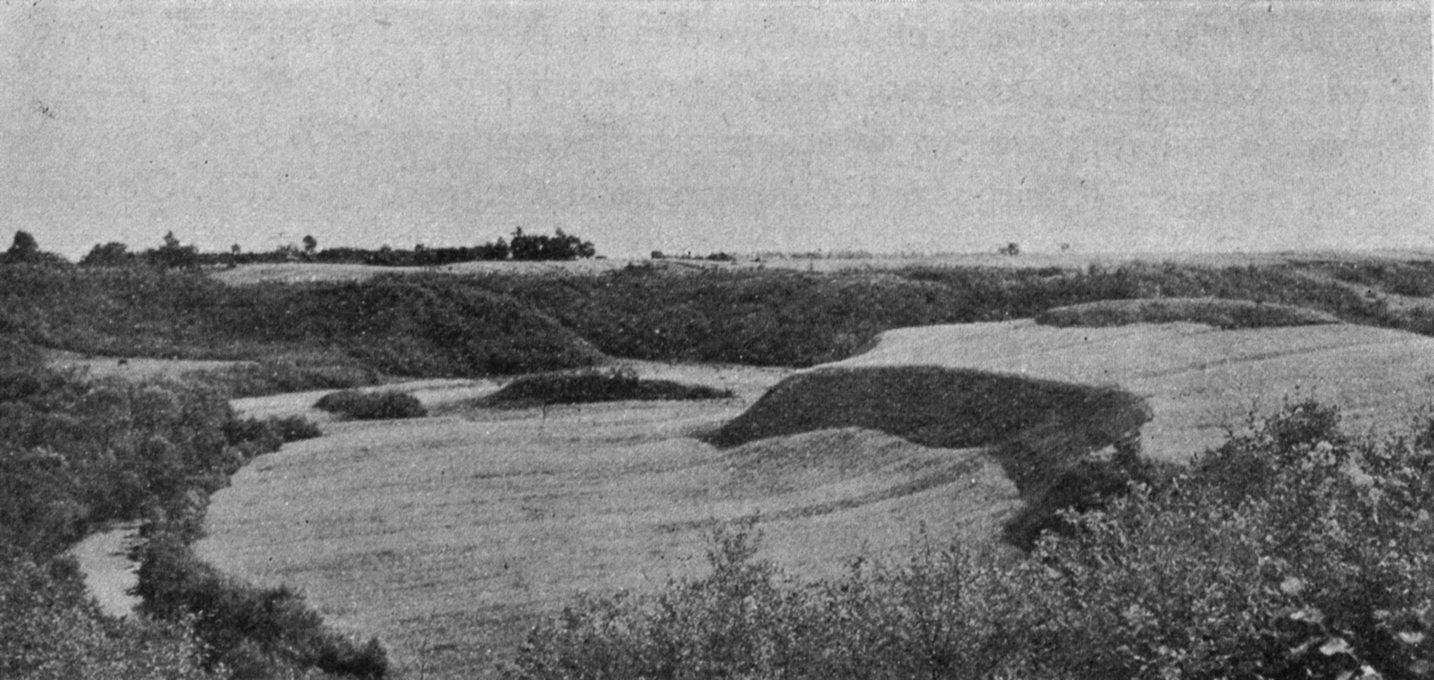 Беларуская (тарашкевіца): Вята (Viata). Замак, валы